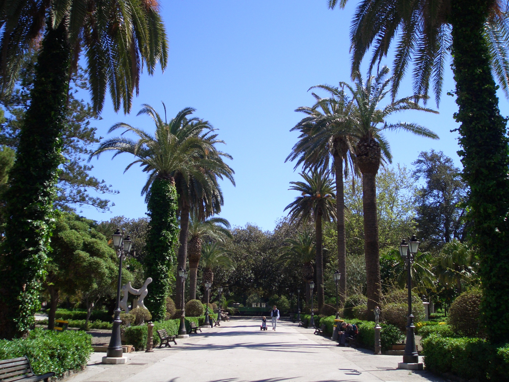 taken april 2005 by Martin Kroetz